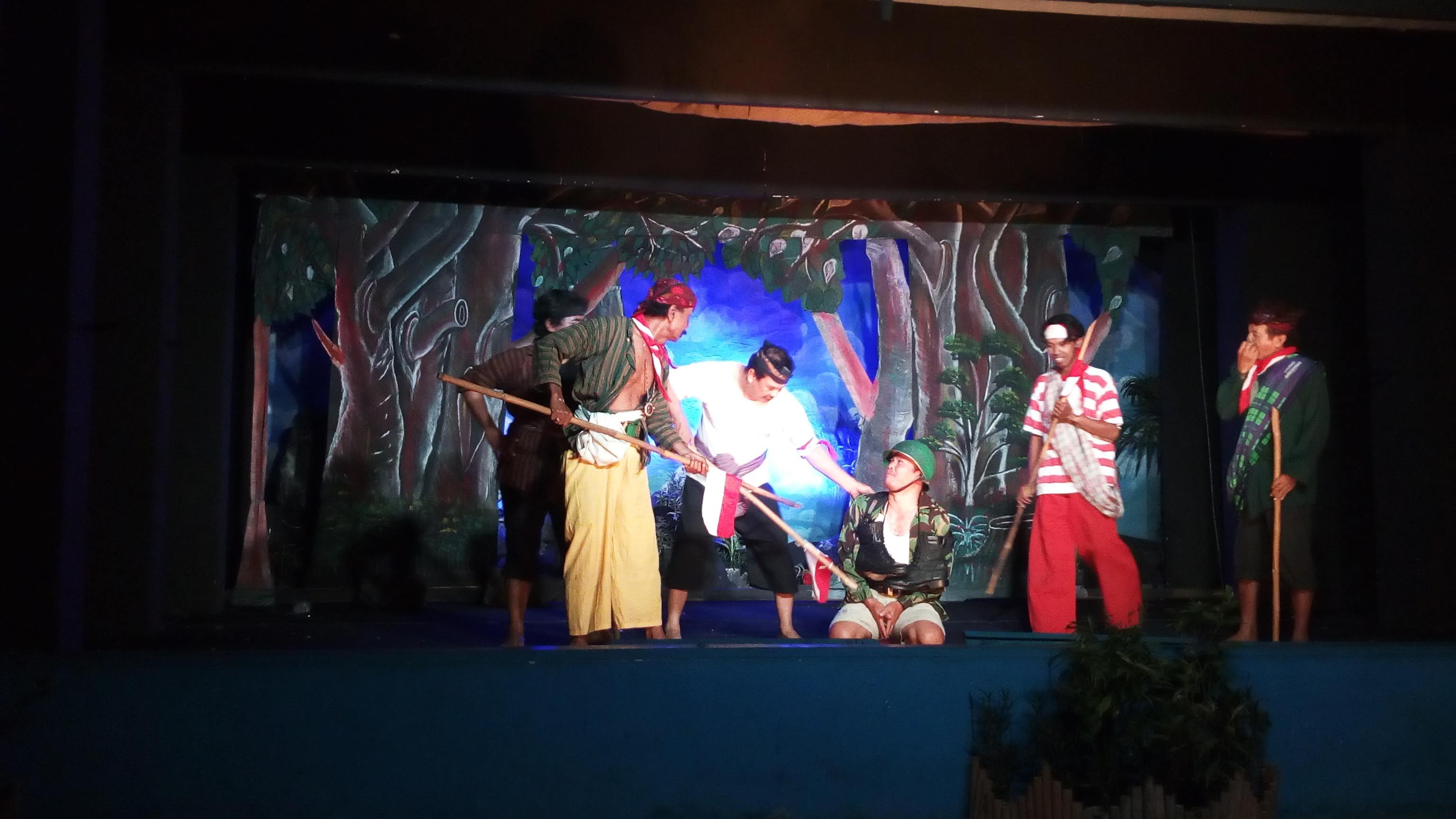 Gedung Ludruk Irama Budaya oleh HS Sumiyani 2